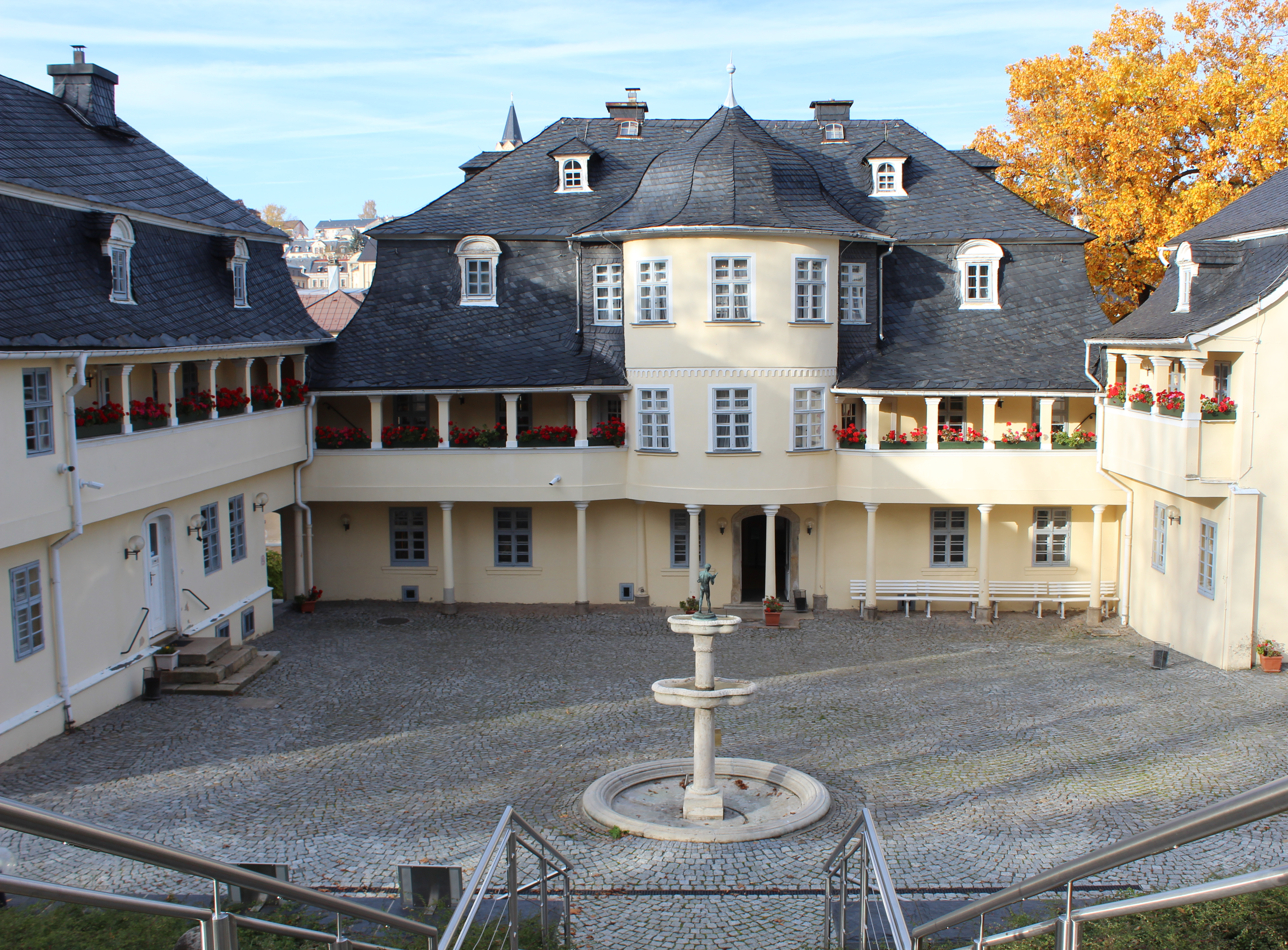 Musikinstrumenten-Museum Markneukirchen, Innenhof im Oktober 2019